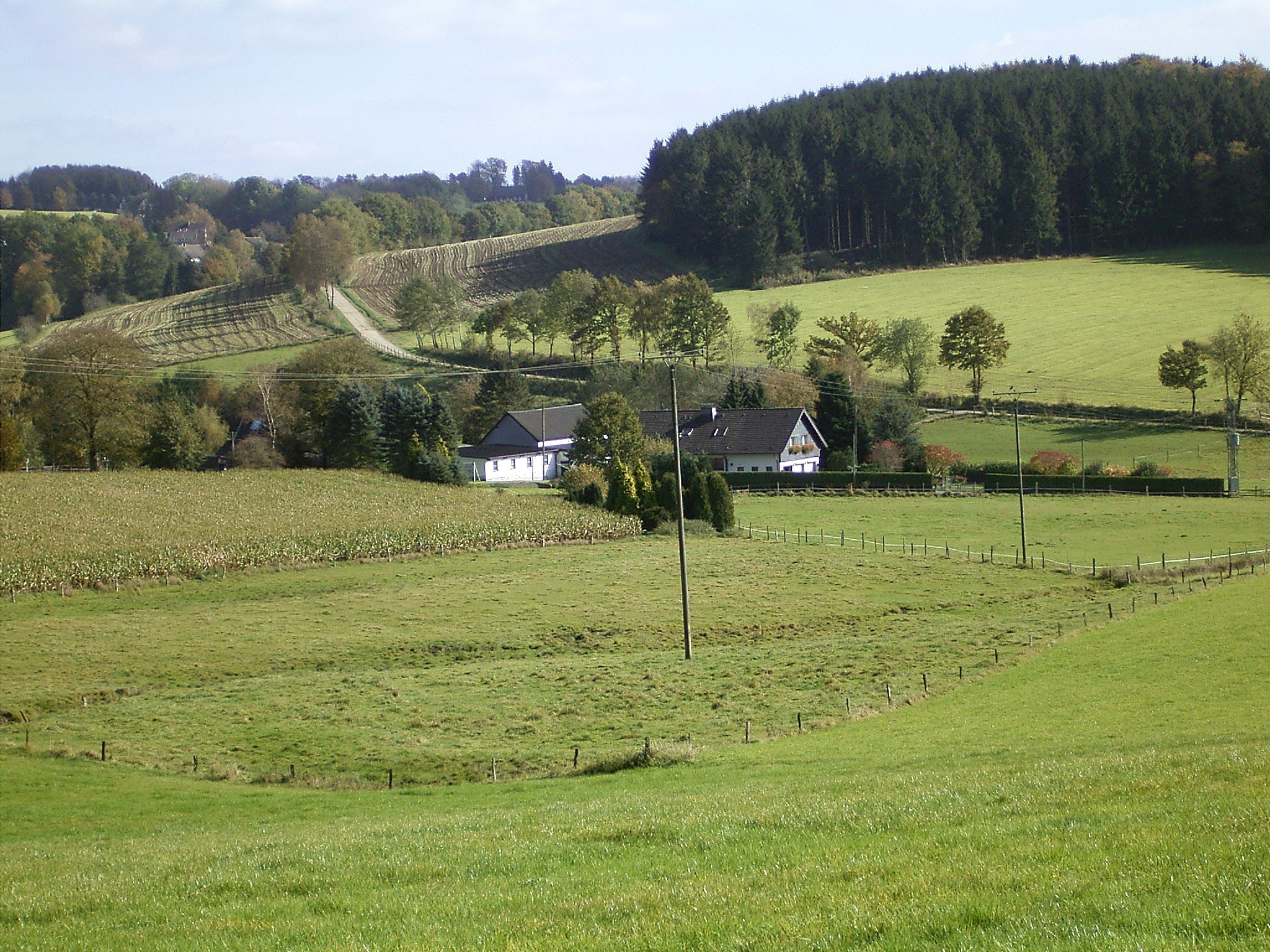 Radevormwald